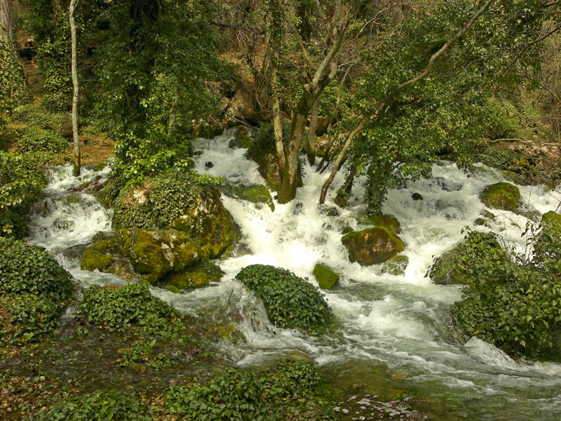 Река Хастабаш весной. Крым,Южный берег.